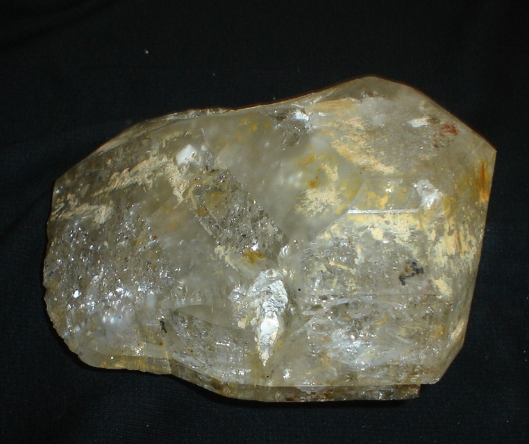 Colorless topaz, Espirito Santo State, Brazil